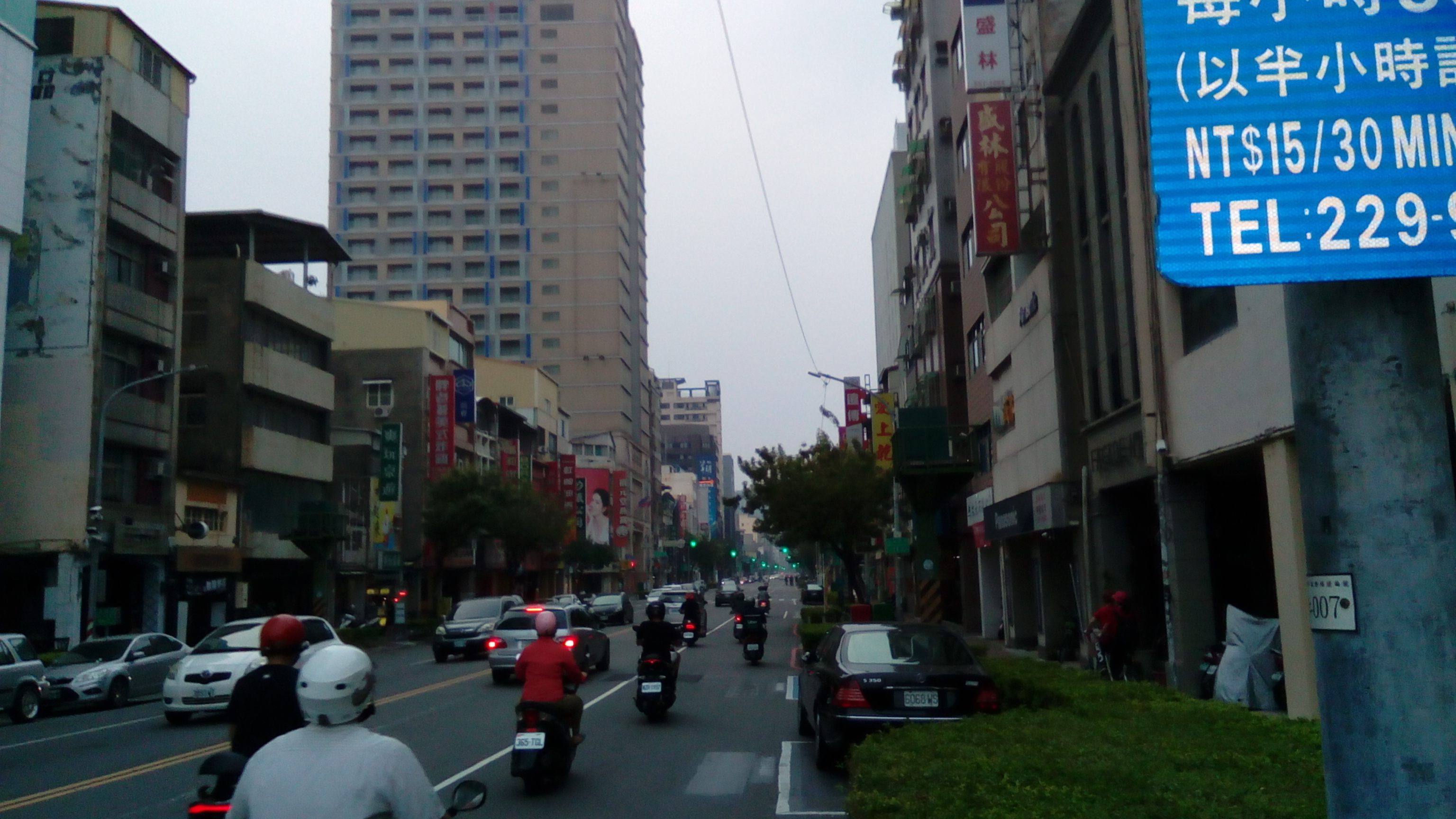 愛河高雄橋附近